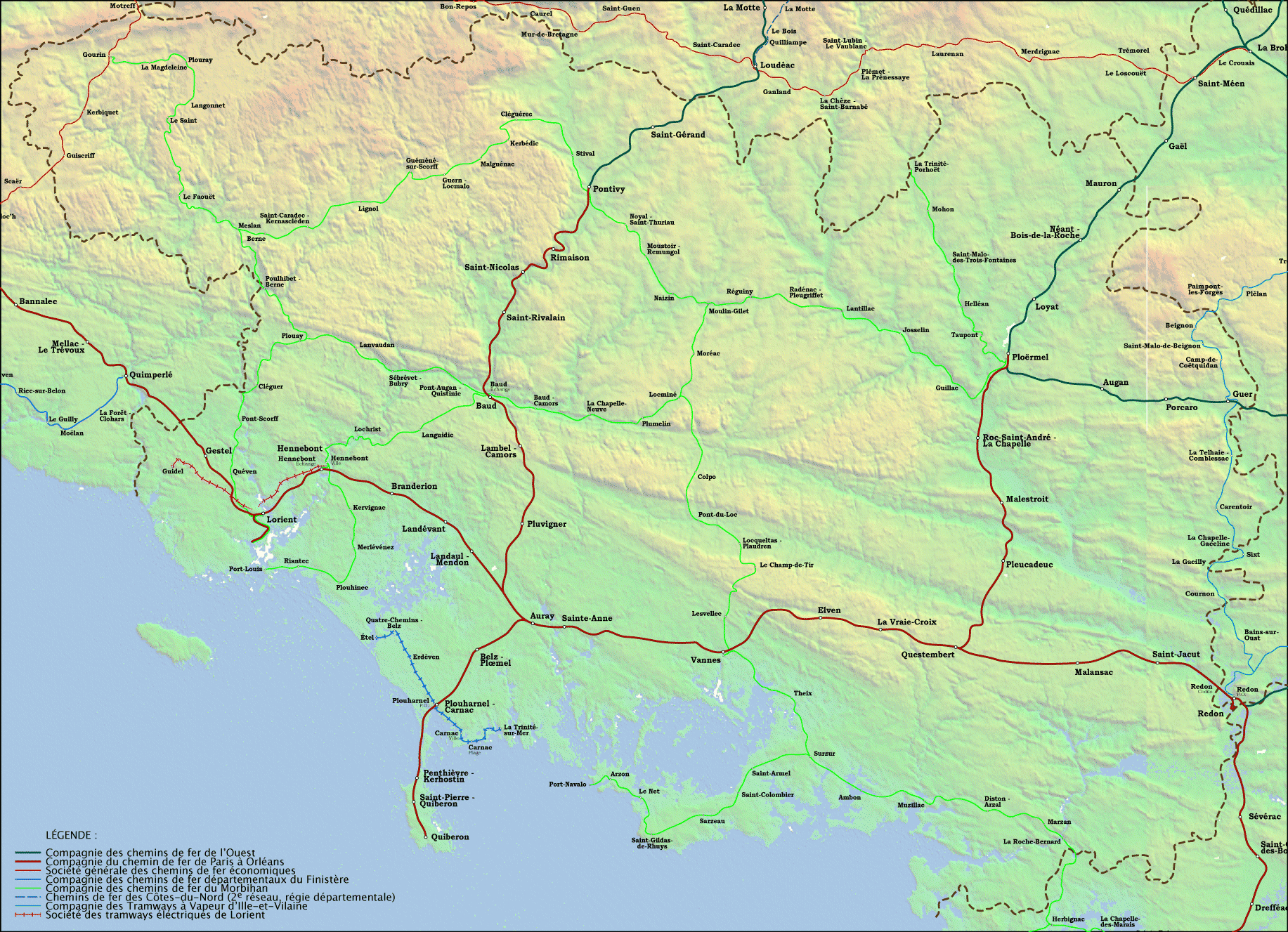 Plan du réseau ferroviaire morbihanais à son apogée